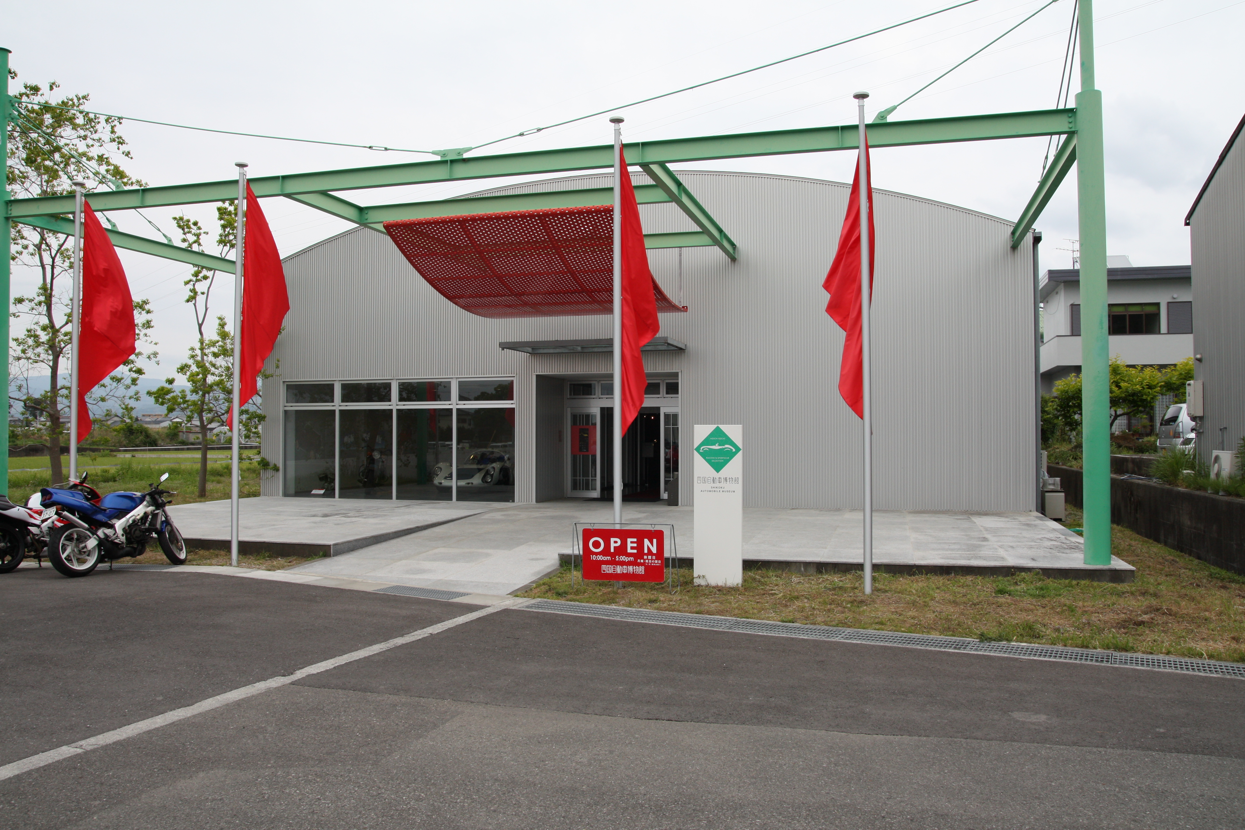 四国自動車博物館外観